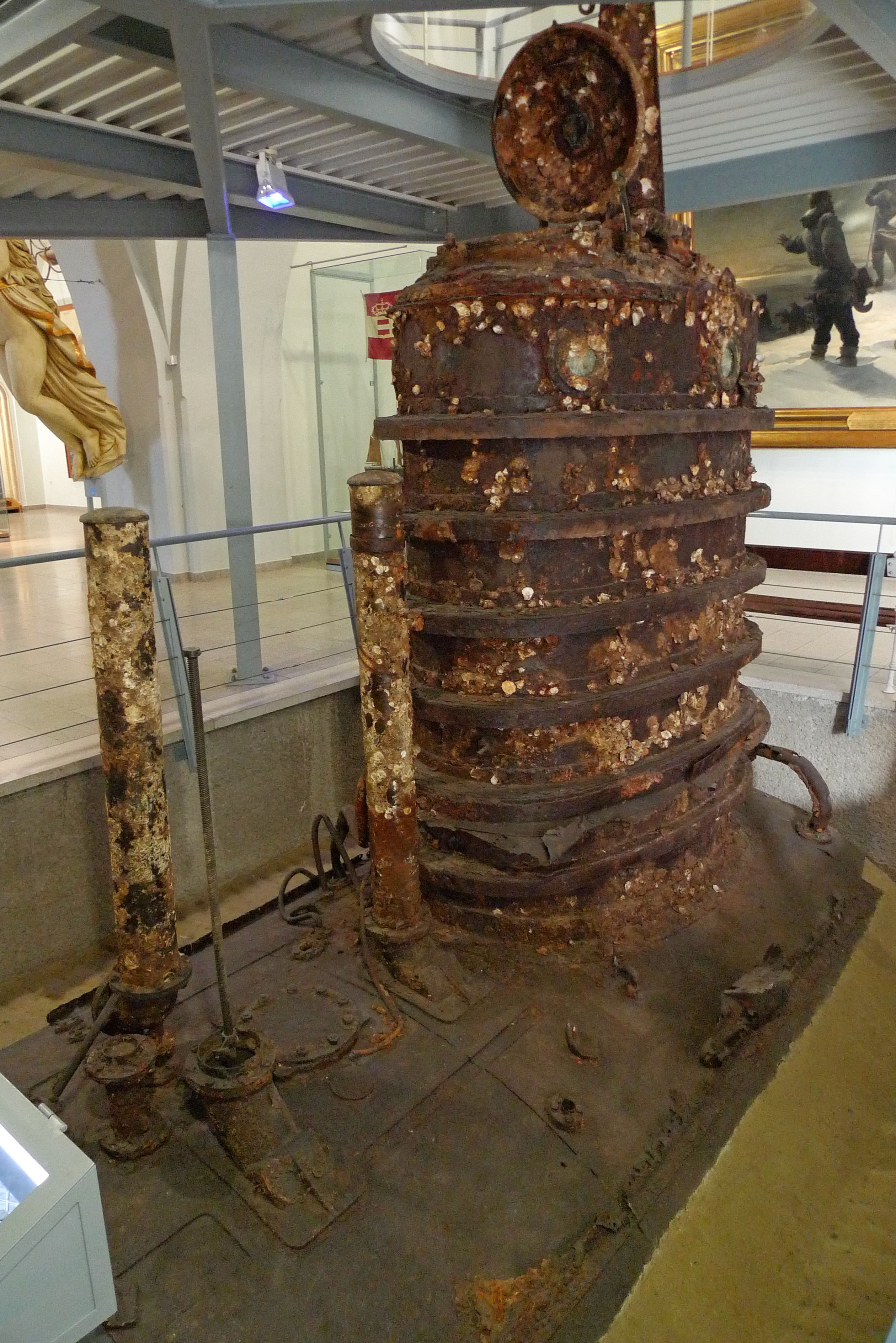 Turm und Druckkörperfragment des U-Boots U-20 (Österreich-Ungarn), Heeresgeschichtliches Museum Wien.